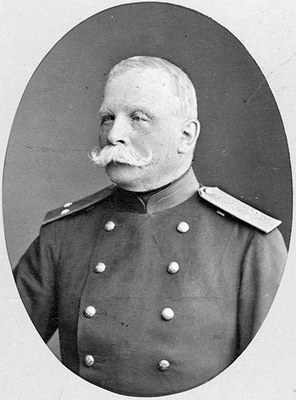 Фото "Левицкий и сын", Санкт-Петербург, ок. 1885 года